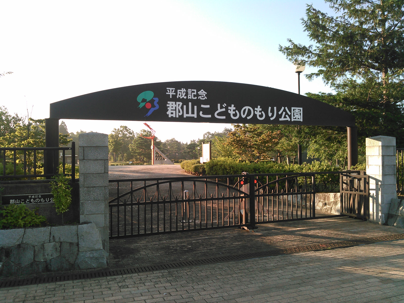 平成記念郡山こどものもり公園